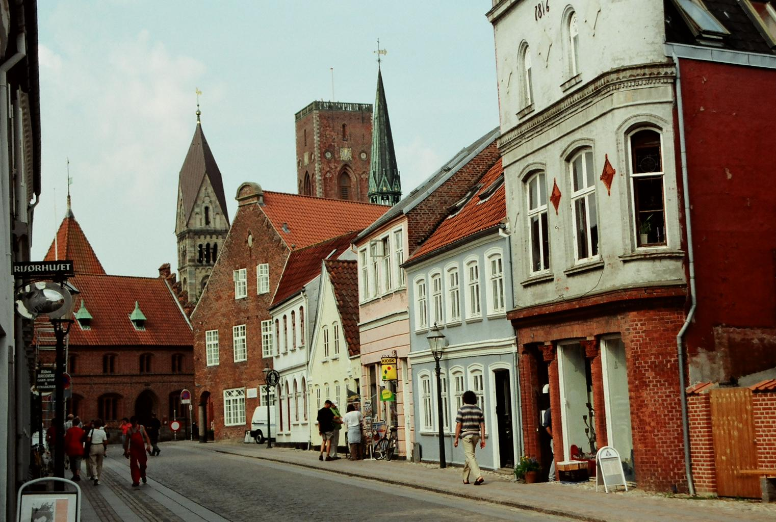 old street in RibeDansk: Dagmarsgade i Ribe